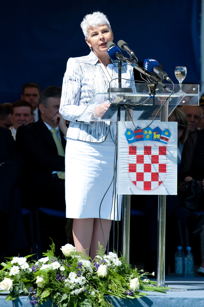 16. obljetnica vojnoredarstvene operacije Oluja u Kninu